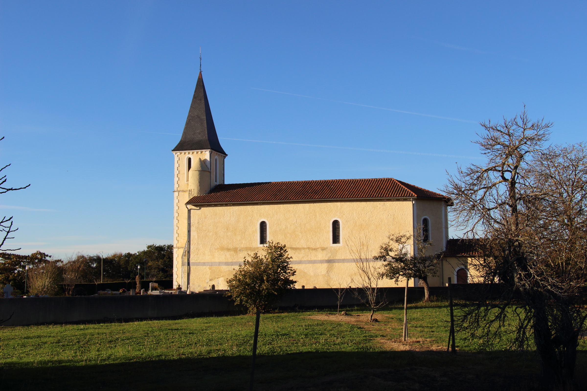 cette église est détruite par Jeanne d’Albret lors des guerres de Religion. Elle est reconstruite entre 1580 et 1620 par le comte de Poudenx qui appartient à la couronne de France.